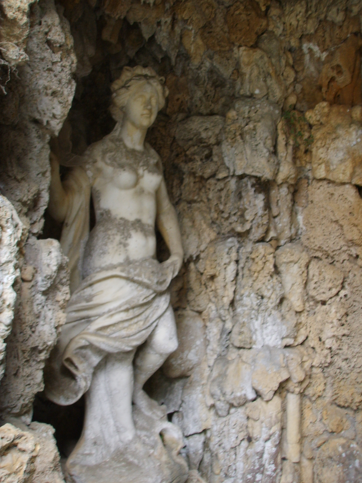 Villa Torrigiani di Lucca, statua.